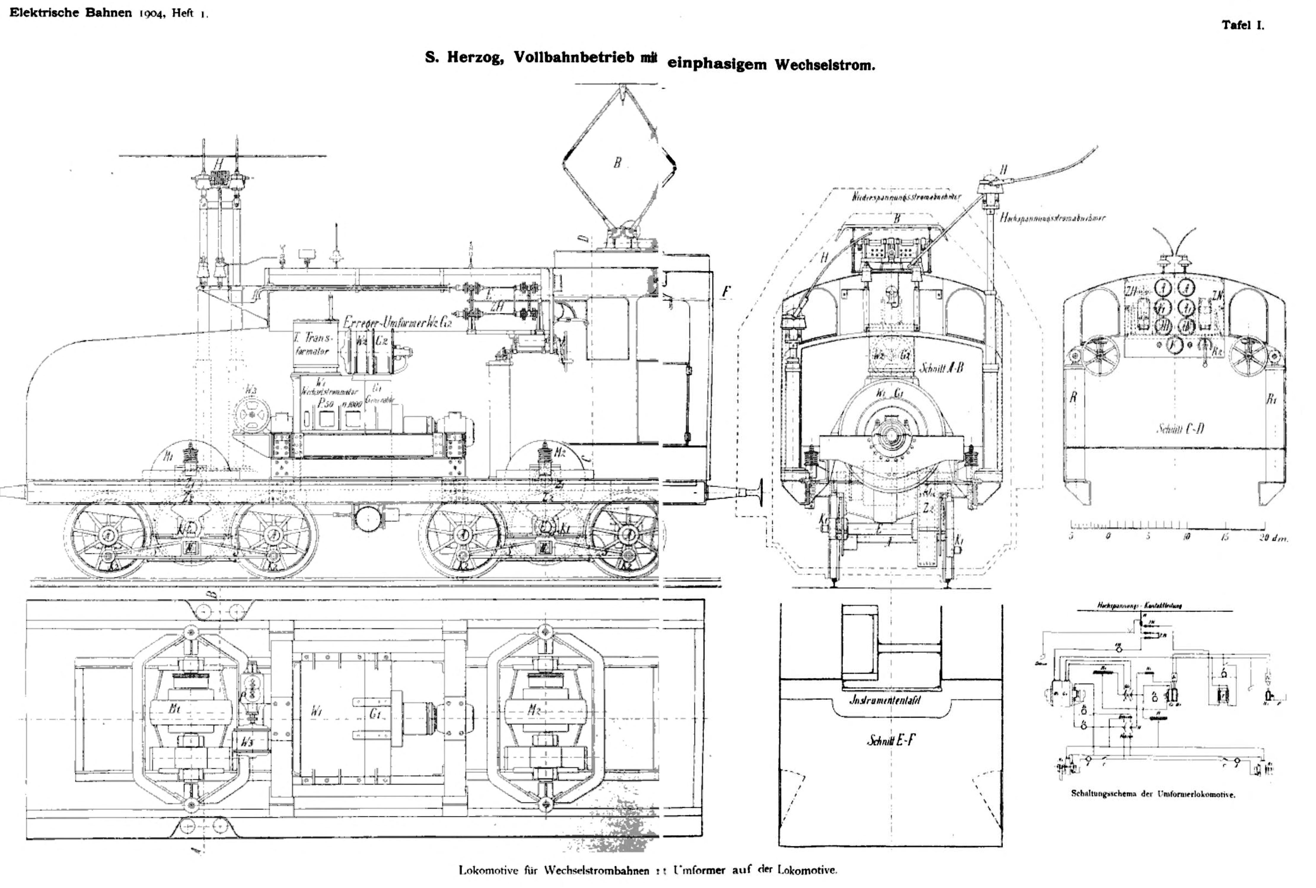 Lokomotive für Wechselstrombahnen mit Umformer auf der Lokomotive. Zeichnung aus einem Aufsatz in der Zeitschrift Elektrische Bahnen von S. Herzog.